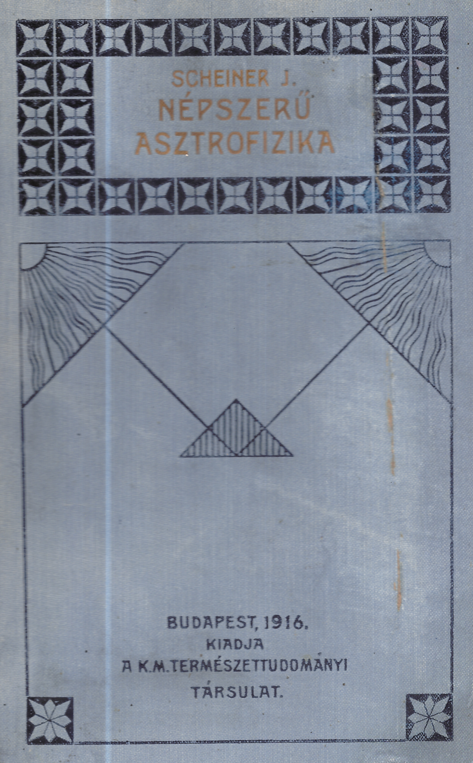 J. Scheiner: Népszerű asztrofizika (1916, a borító készítője nem ismert)